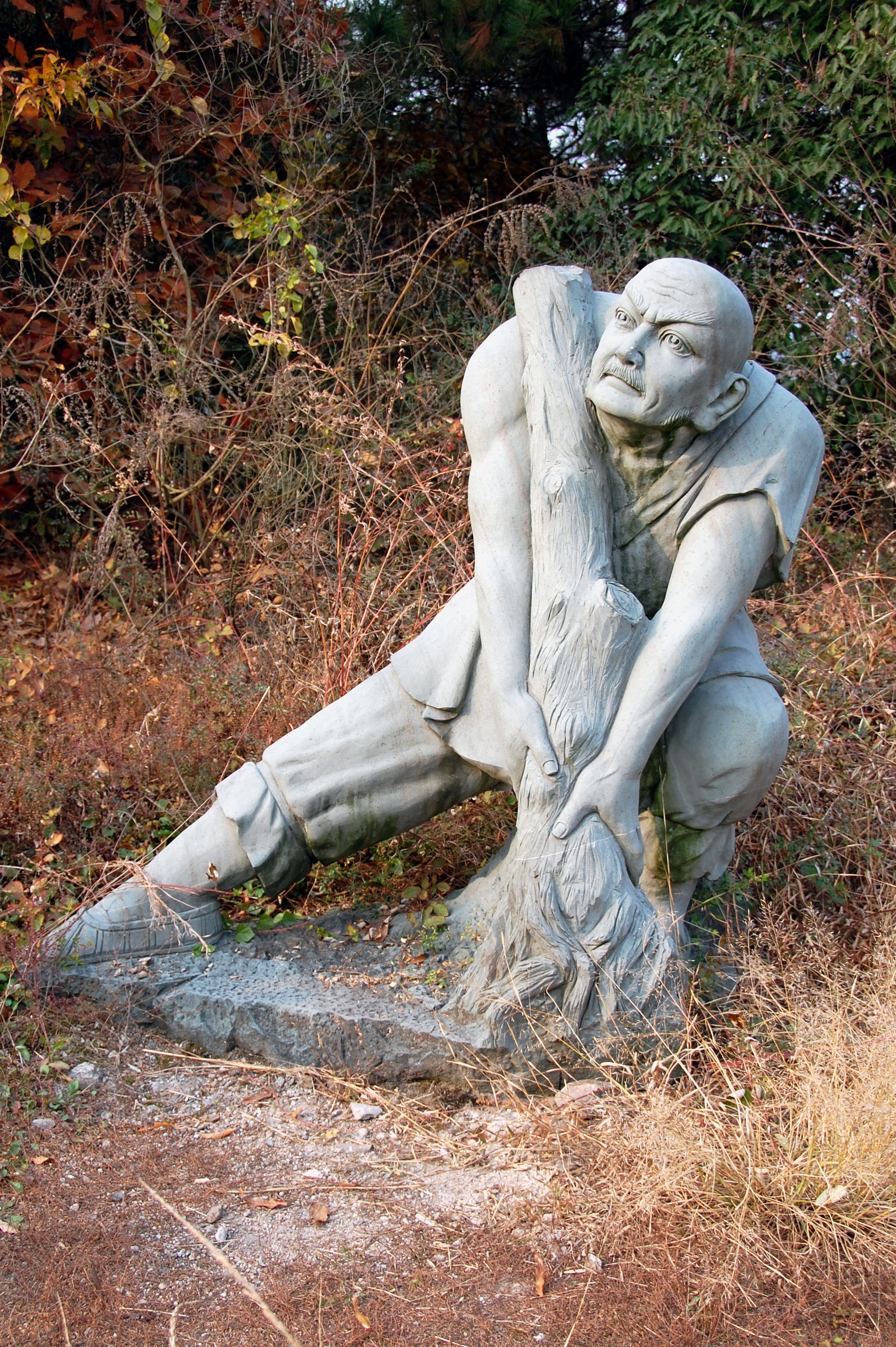 清明上河図/清明上河图